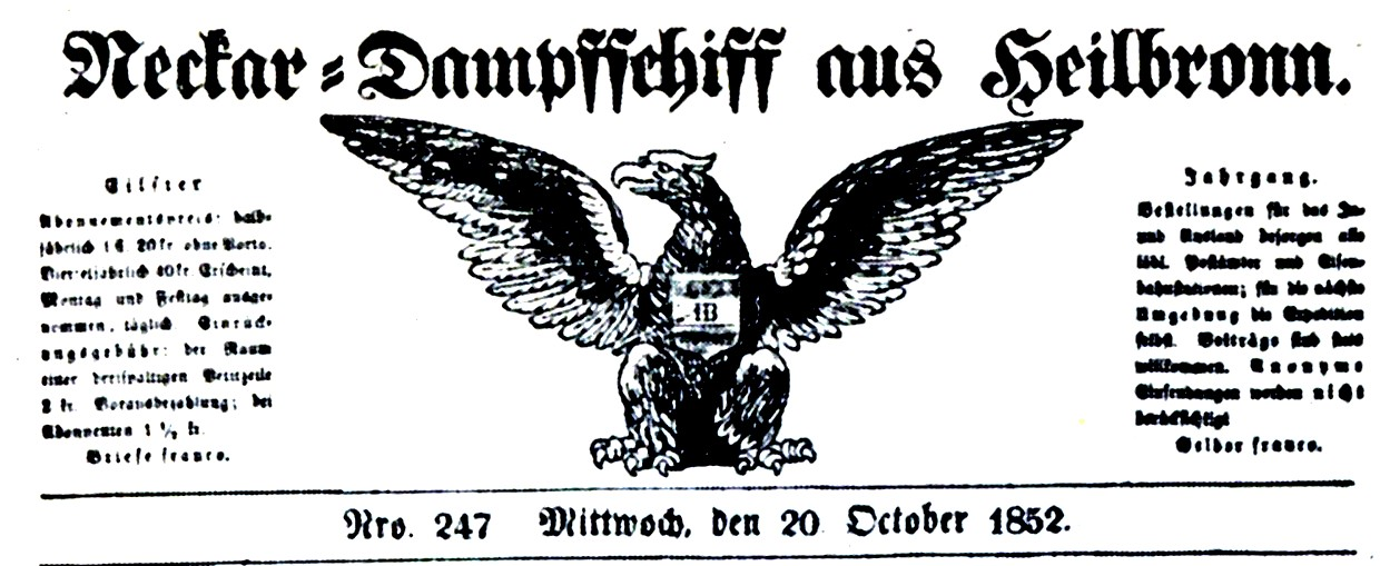 Titelkopf der Heilbronner Zeitung Neckar-Dampfschiff aus Heilbronn